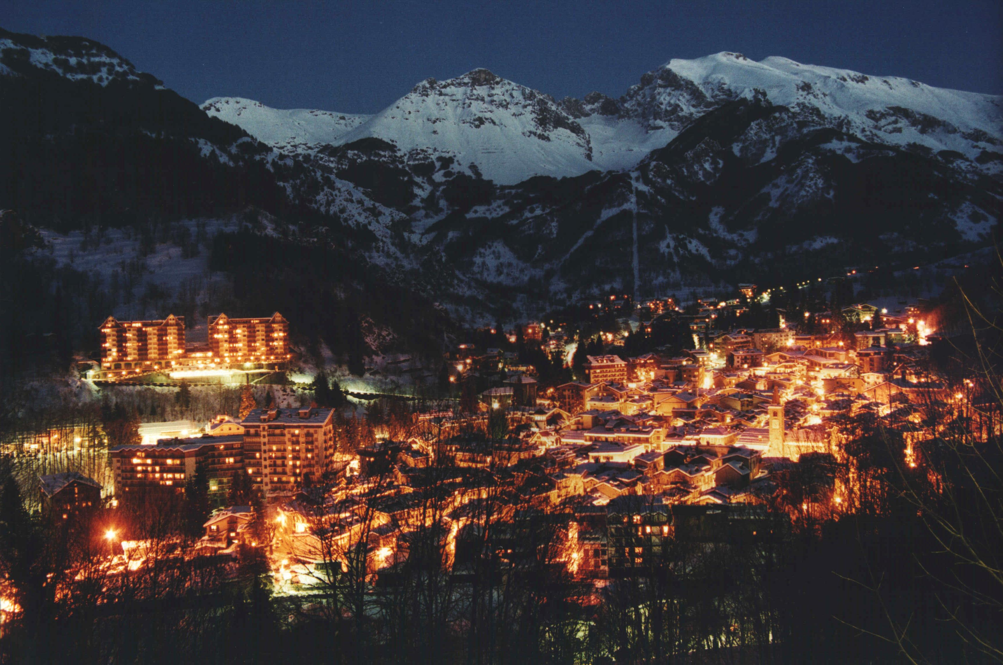 Panorama Limone Piemonte